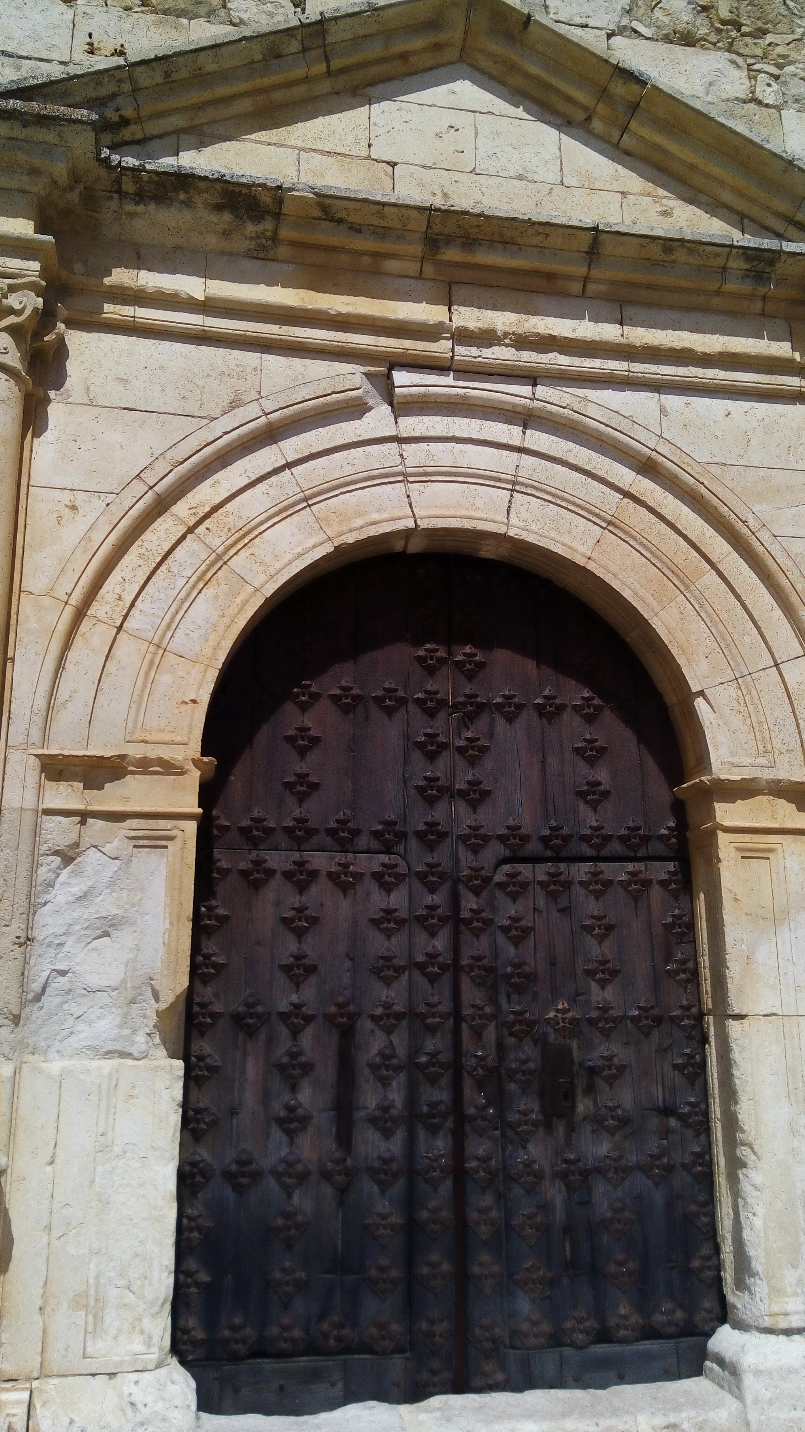 Portada Renacentista de la Iglesia sXVI